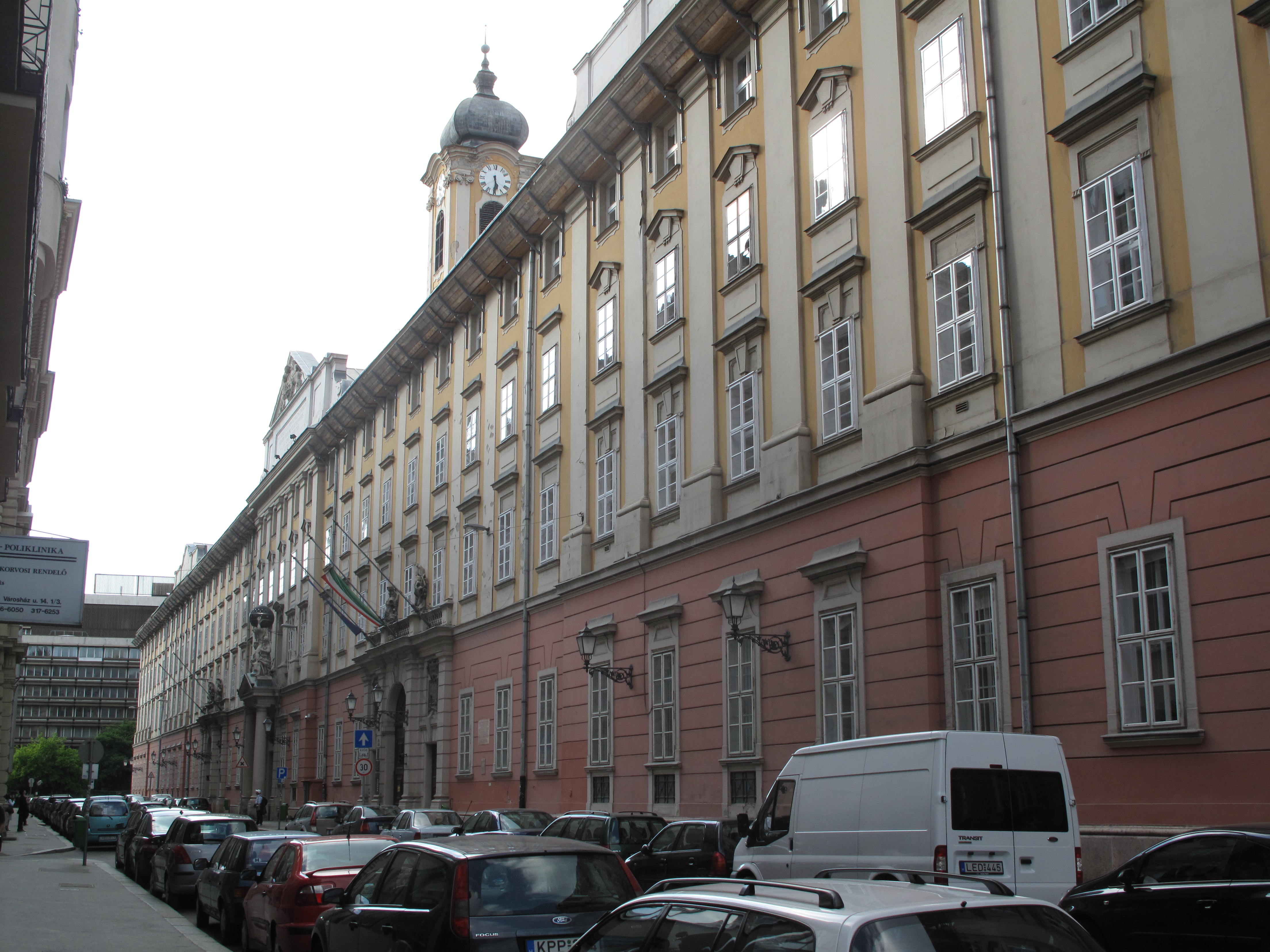 Budapešť